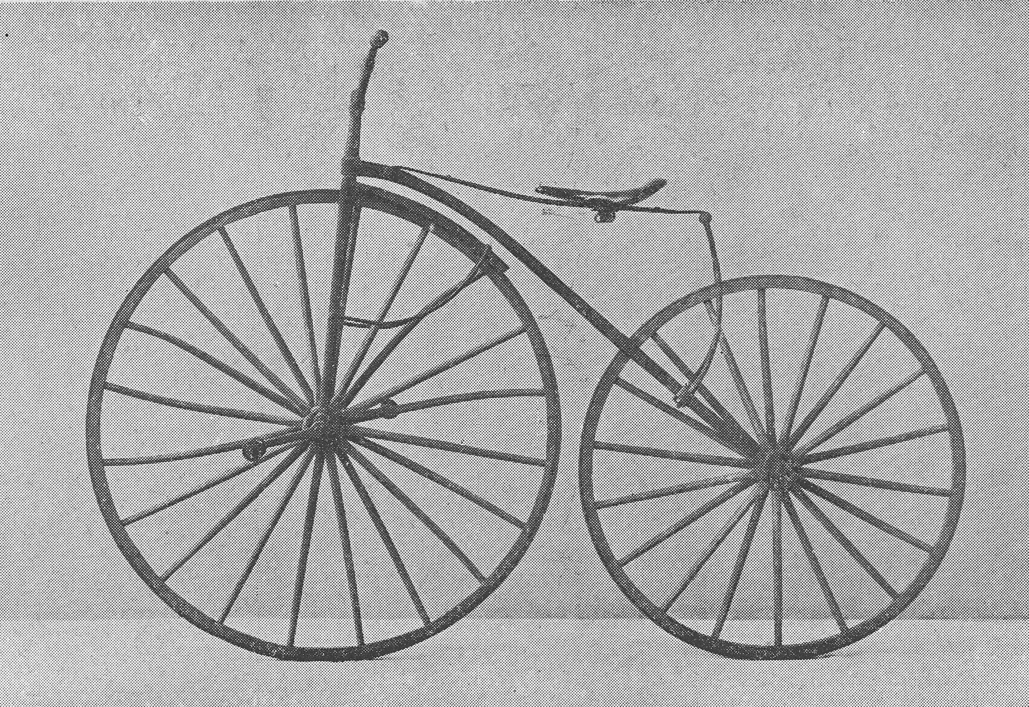 Das zweite Modell, das von der Burgers-Eerste Nederlandsche Rijwielfabriek hergestellt wurde, ca. 1870